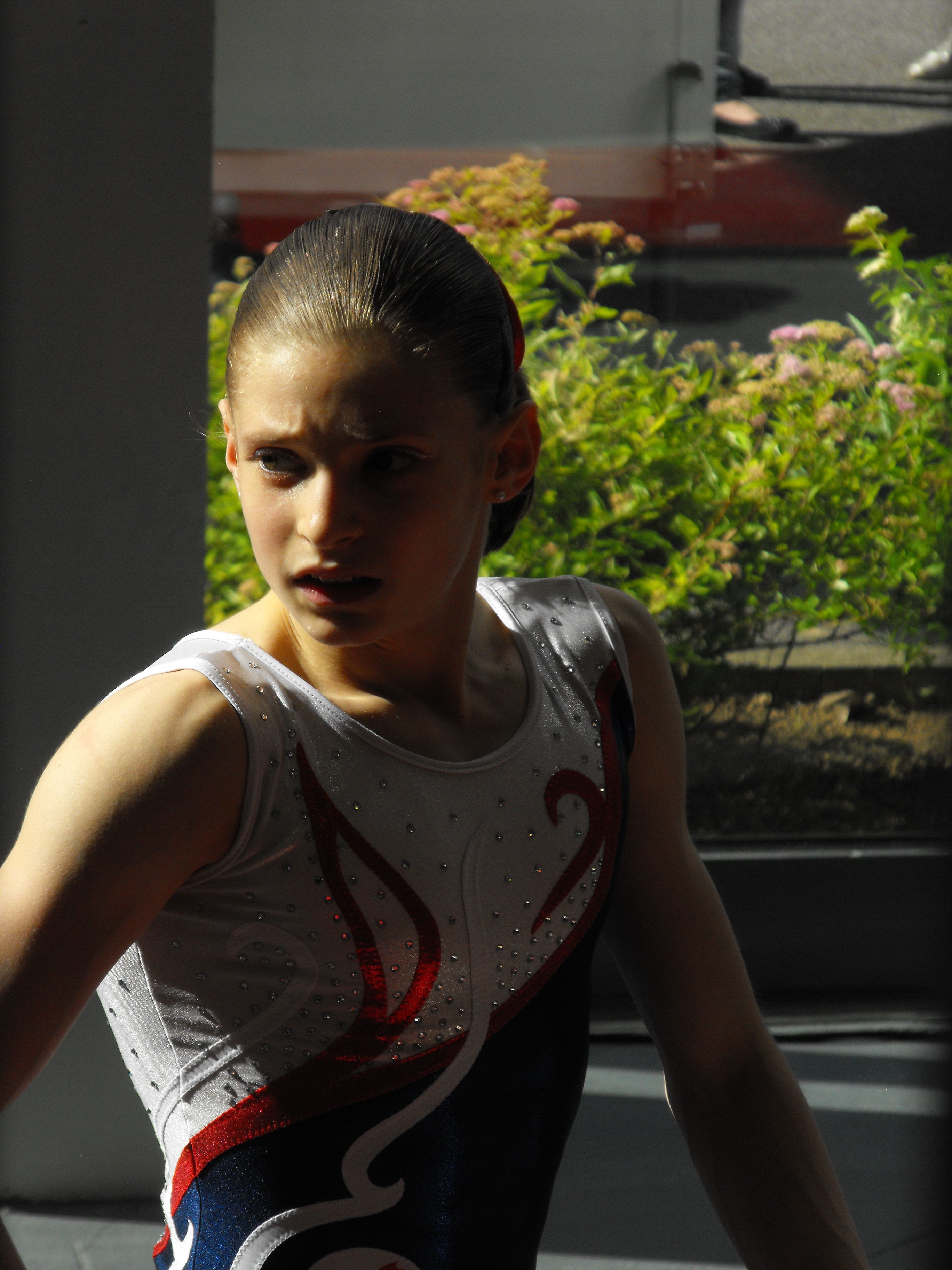 Anne Kuhm au tournoi international de Haguenau le 23 juin 2012.